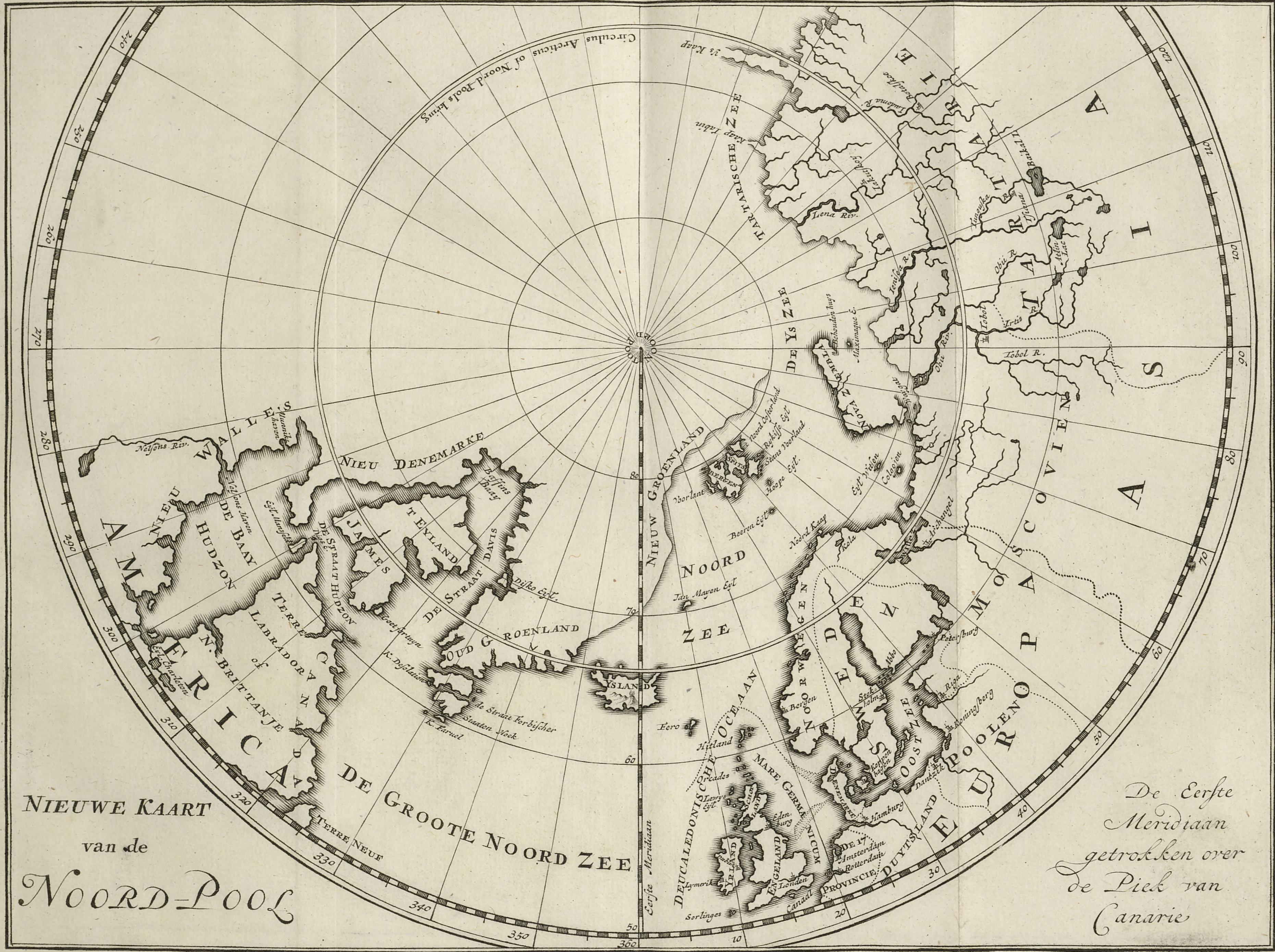 Illustrasjon hentet fra boken "C.G. Zorgdragers Bloeyende opkomst der aloude en hedendaagsche Groenlandsche visschery" av Zorgdrager, Cornelis Gijsbertsz og utgitt av By Joannes Oosterwyk (nl, 1720)